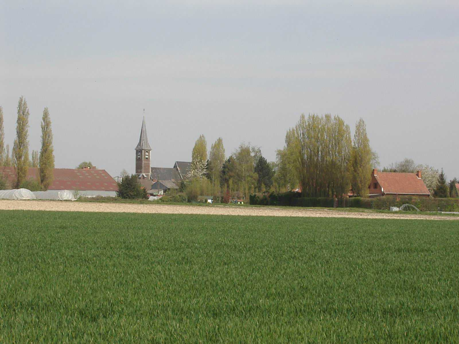 Louvil